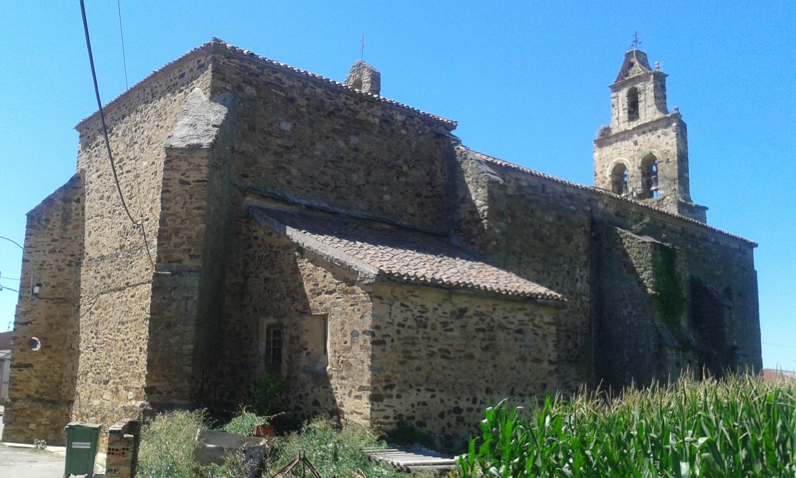 Nave trasera y campanario de la parroquia de San Andrés